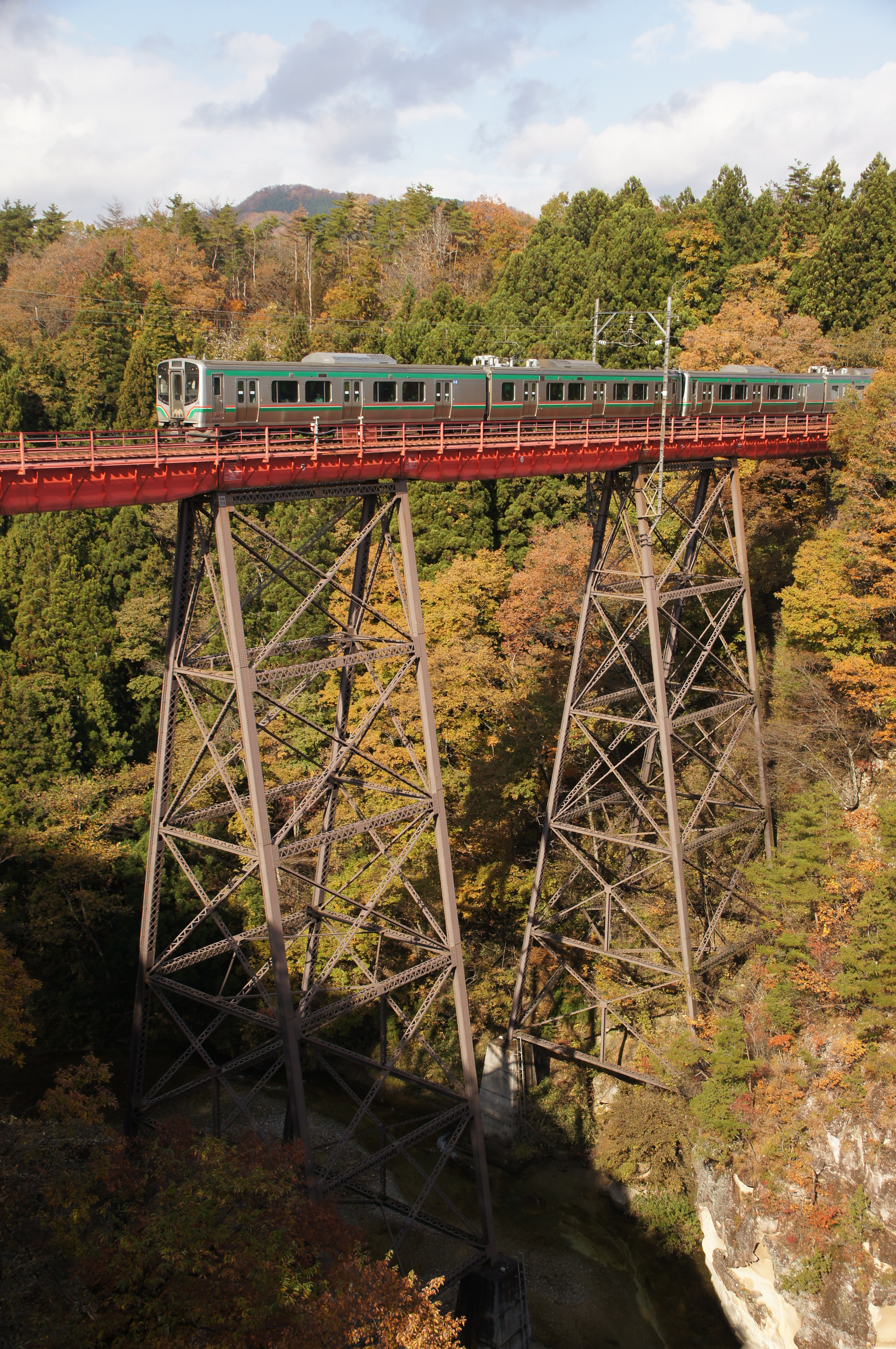 第二広瀬川橋梁を国道48号線熊ヶ根橋から撮影。